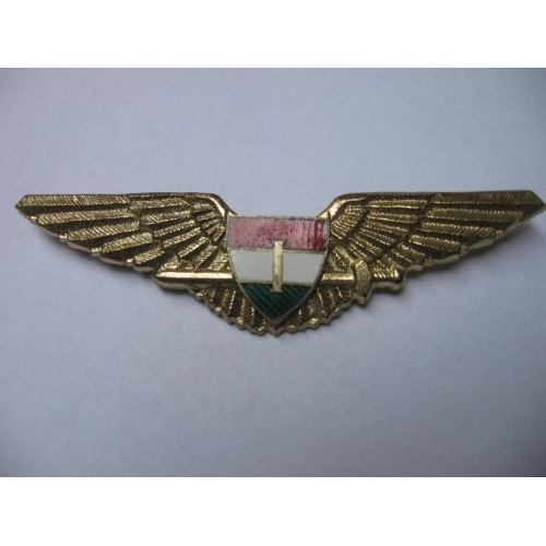 Magyar Légierő - I. osztályú repülőgépvezető